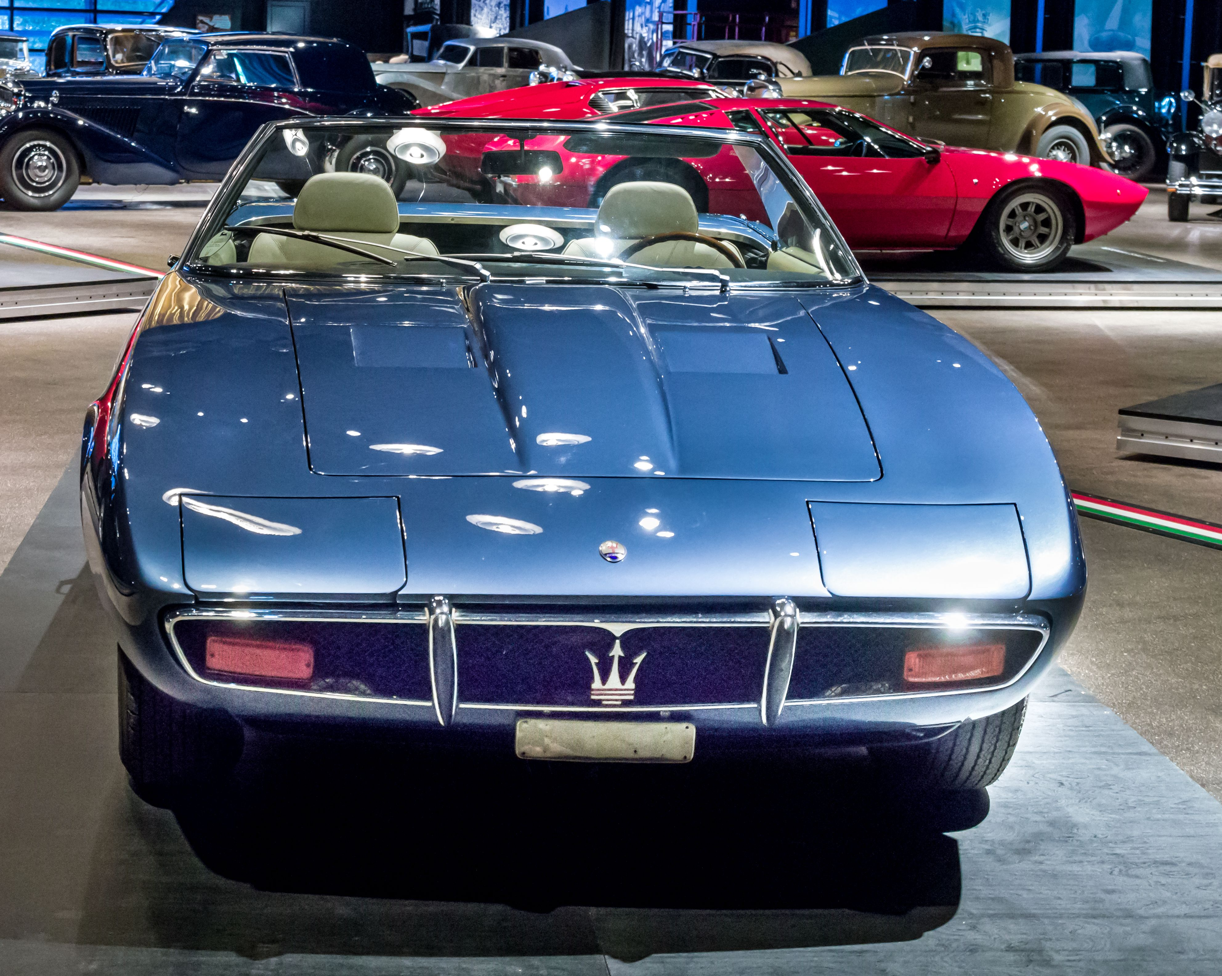 Das Volante Oldtimermuseum in Kirchzarten